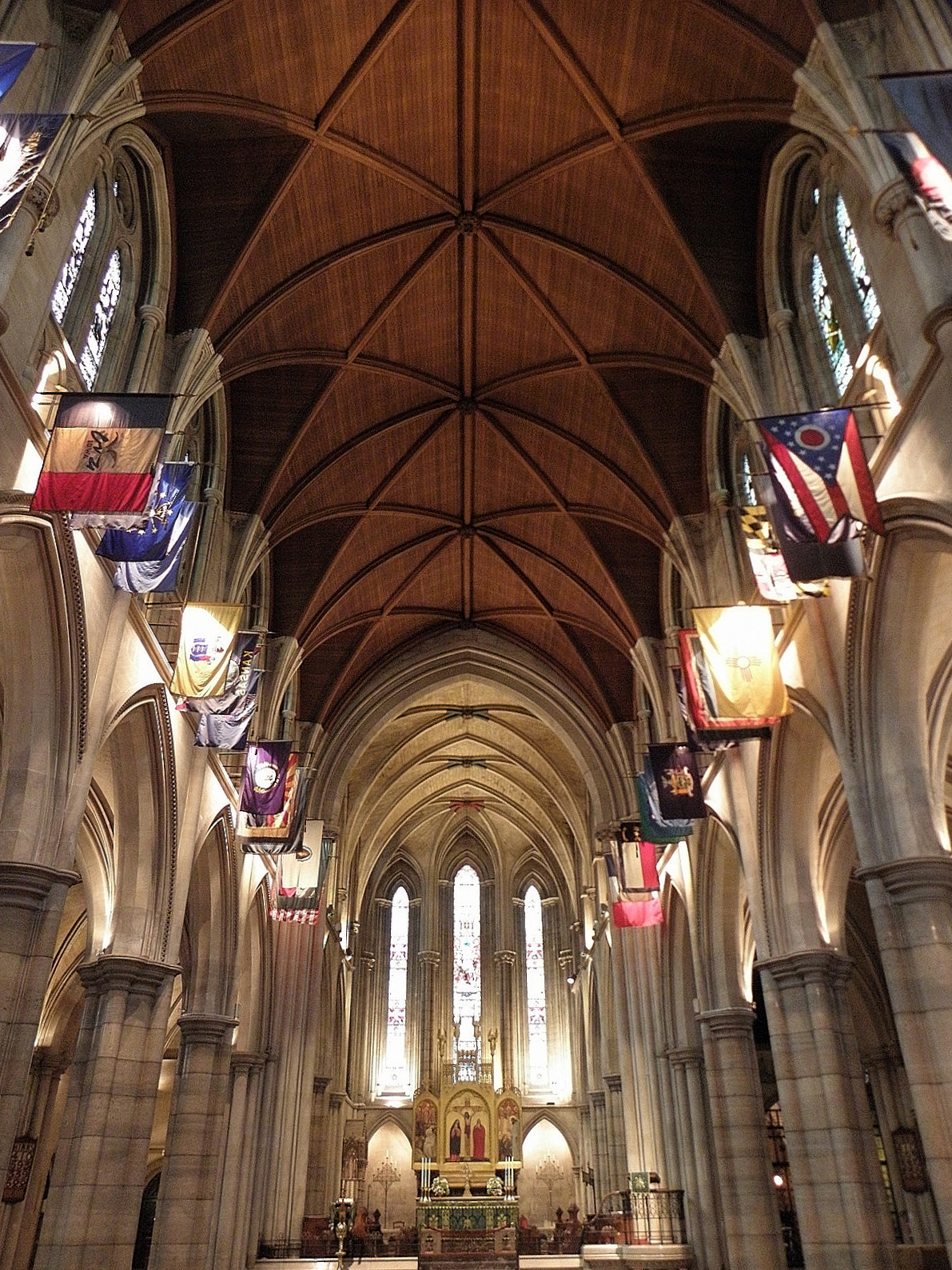 Nef principale de la cathédrale américaine de Paris (75).